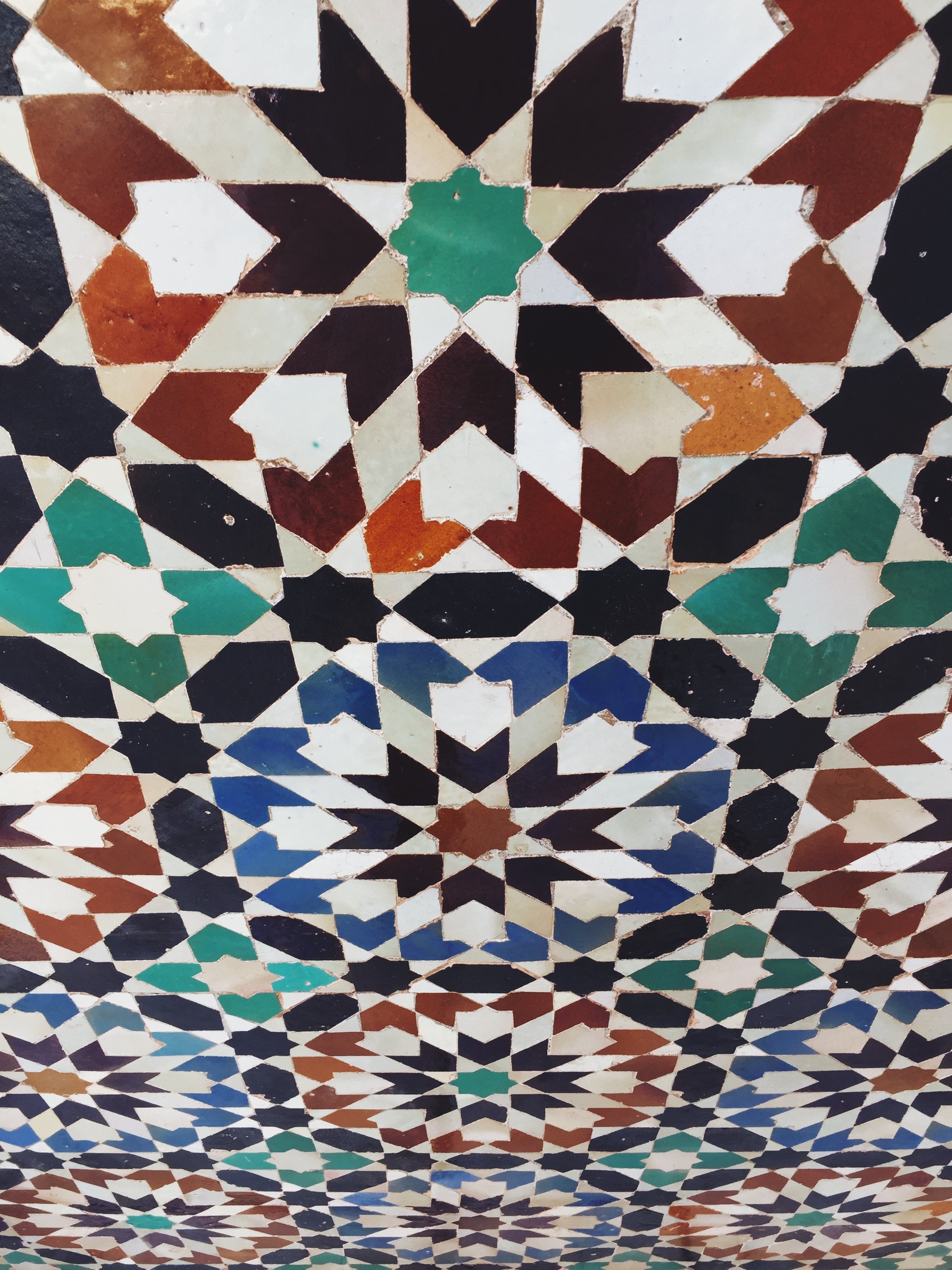 نظرة مقربة للزليج في مدرسة ابن يوسف في مراكش